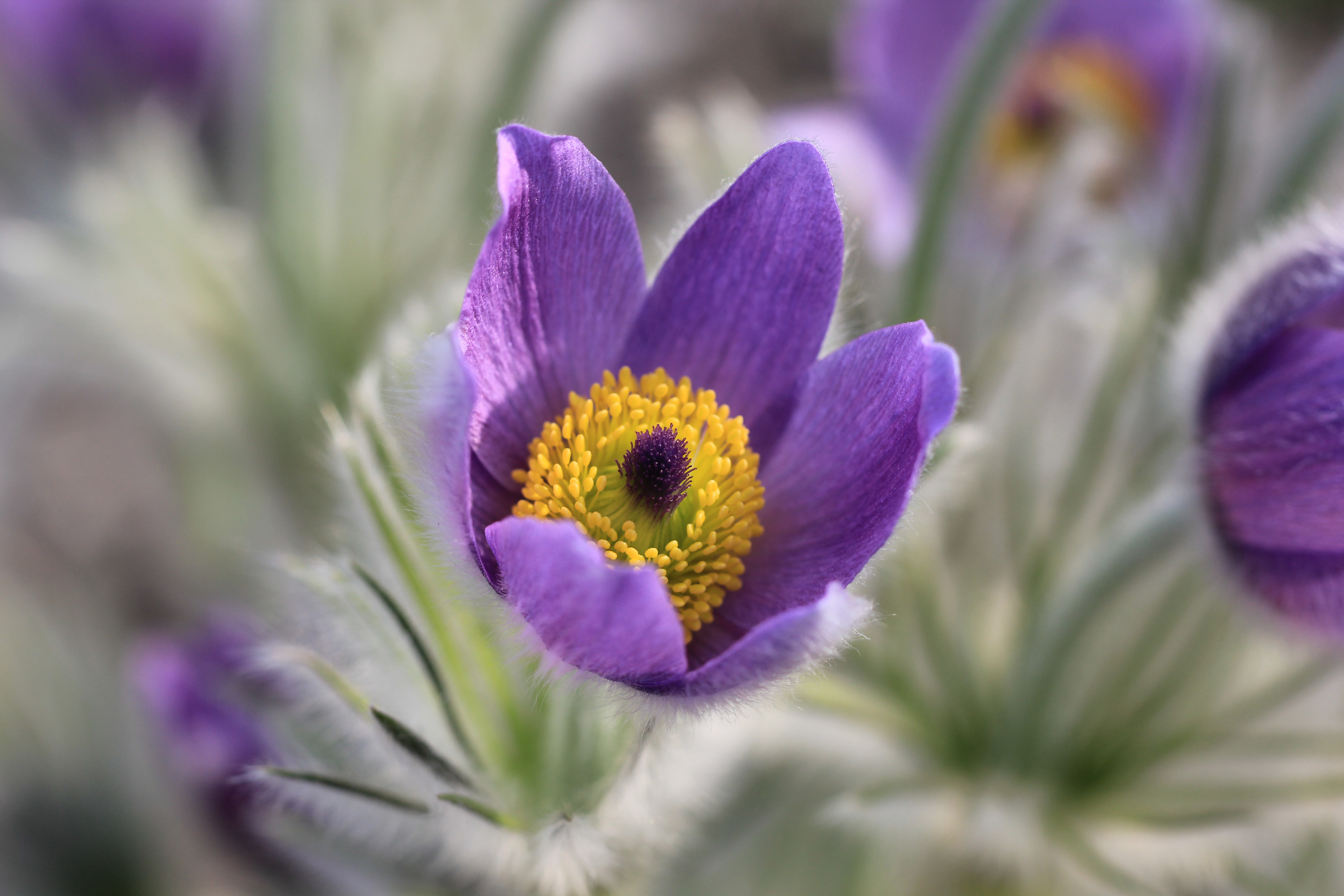 Große Kuhschelle im Botanischen Garten der Universität Wien.